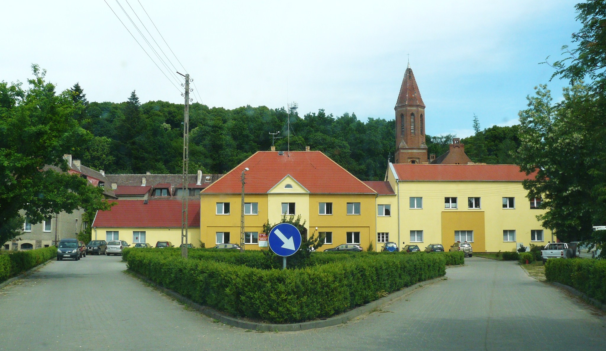 Głusko - serce Drawieńskiego Parku Narodowego.